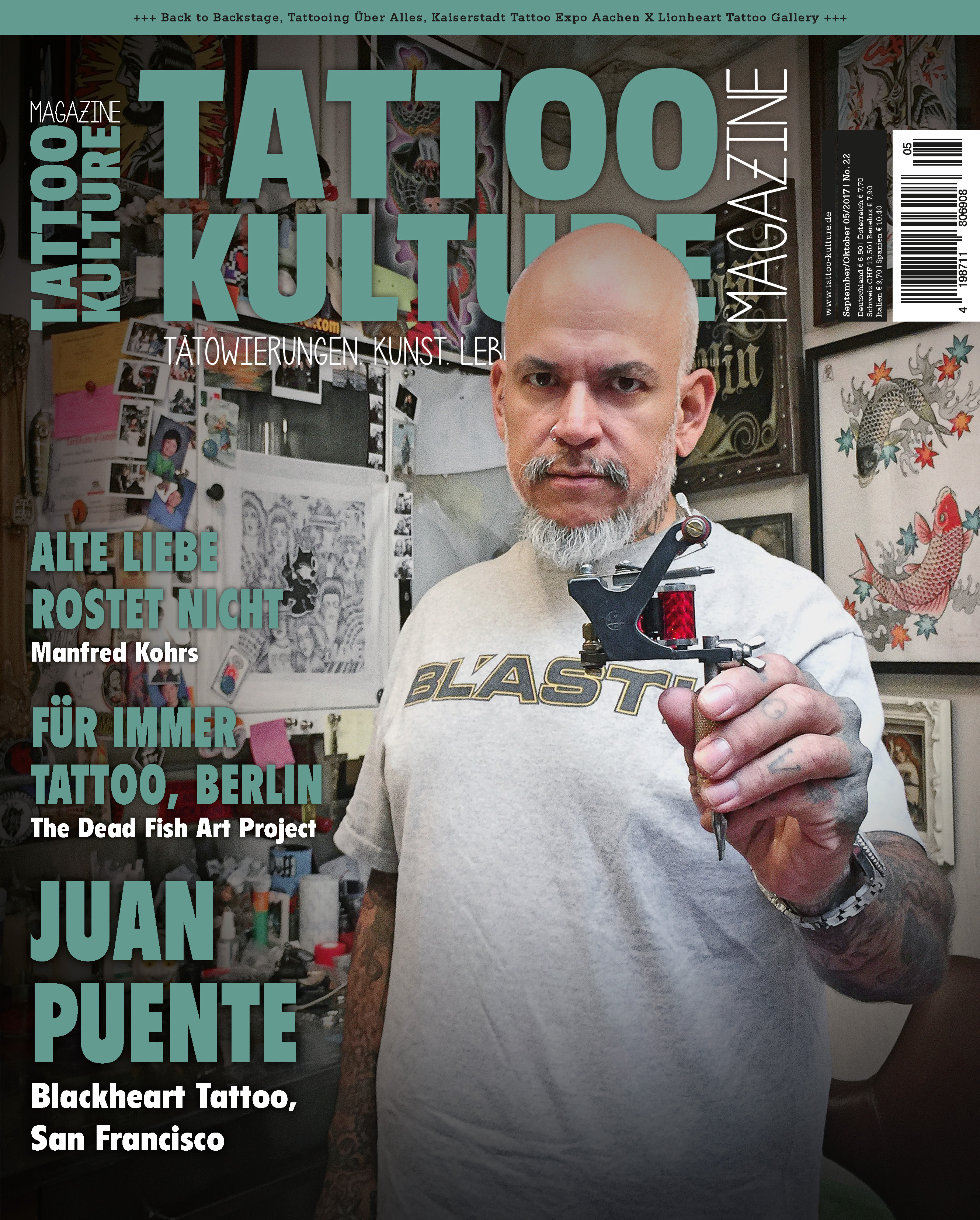 Titelseite des Tattoo Kulture Magazine Ausgabe 5 / 2017